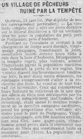 Article publié le 26 janvier 1913 dans le journal Le Journal à propos de la tempête qui ruina des pêcheurs du port de Poulgoazec